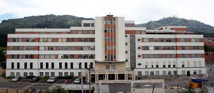 Foto San Bartolo